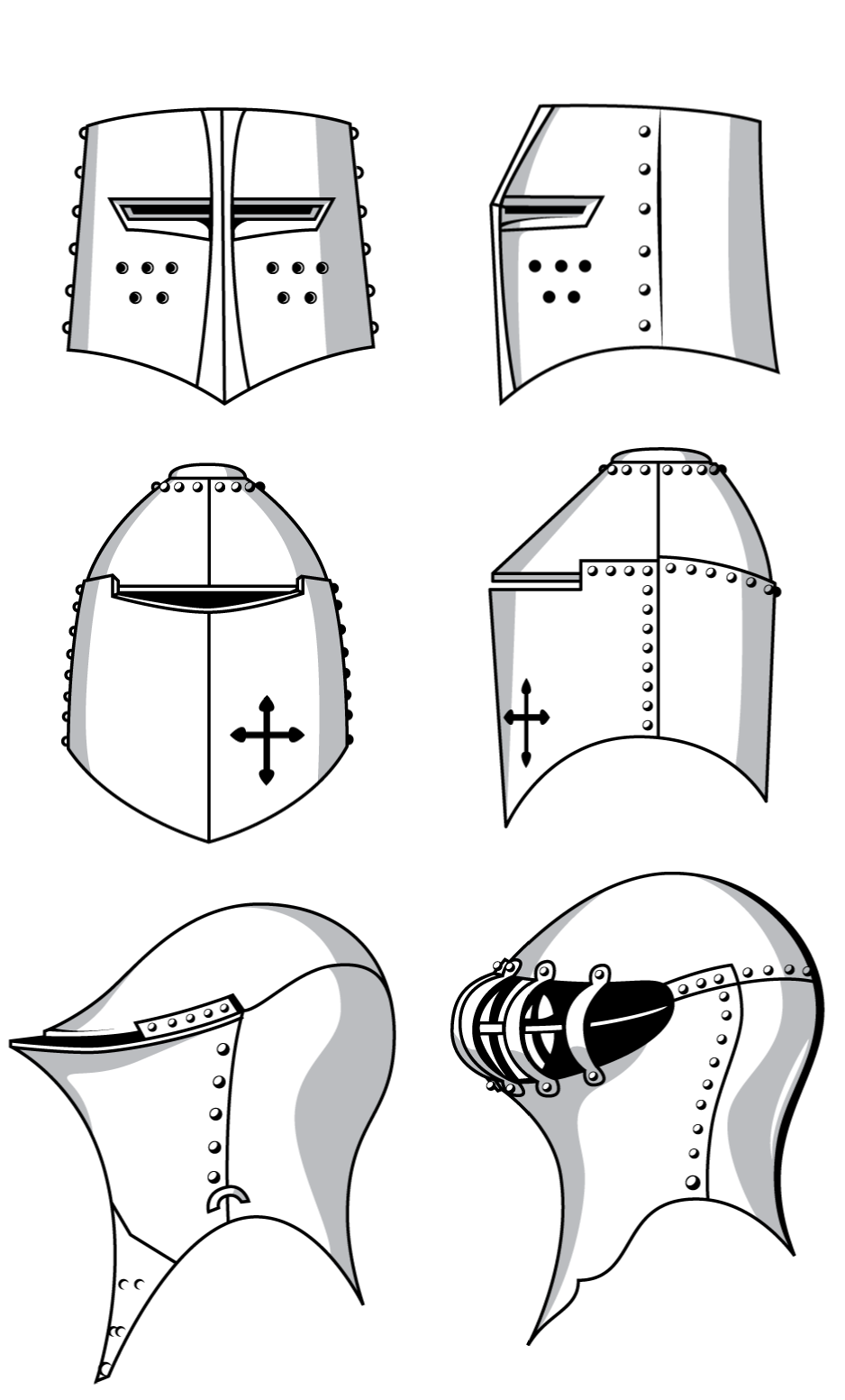 Heraldic helmets